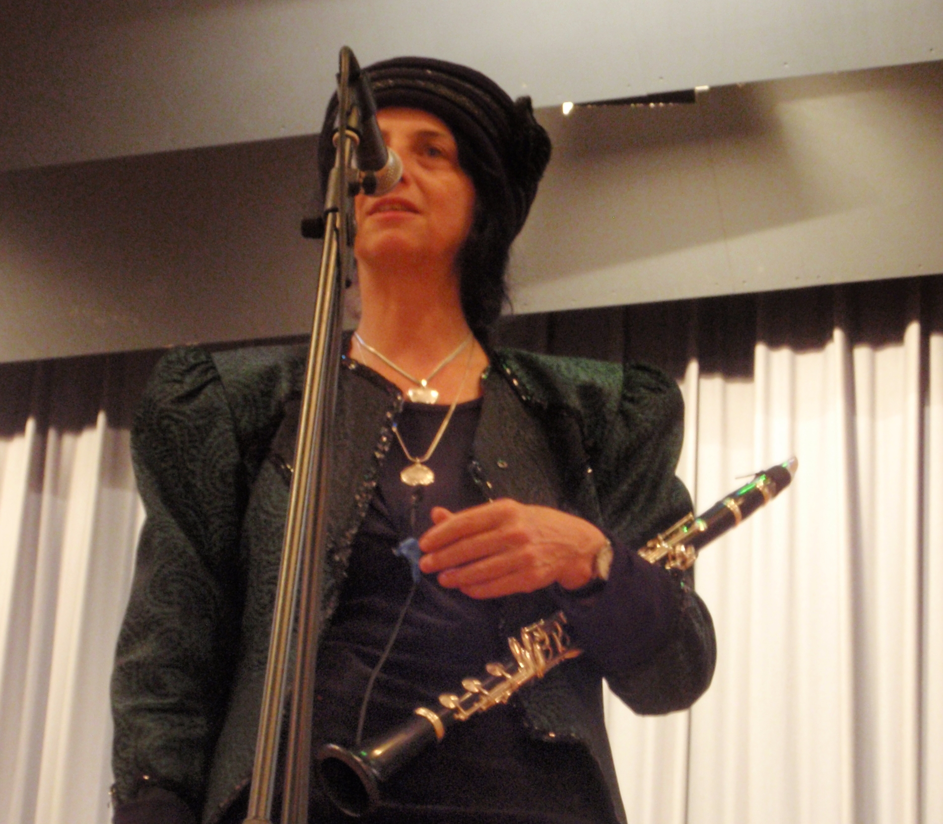 die Klezmer-Klarinettistin Irith Gabriely im November 2008 während eines Konzerts in Alsbach-Hähnlein, Hessen